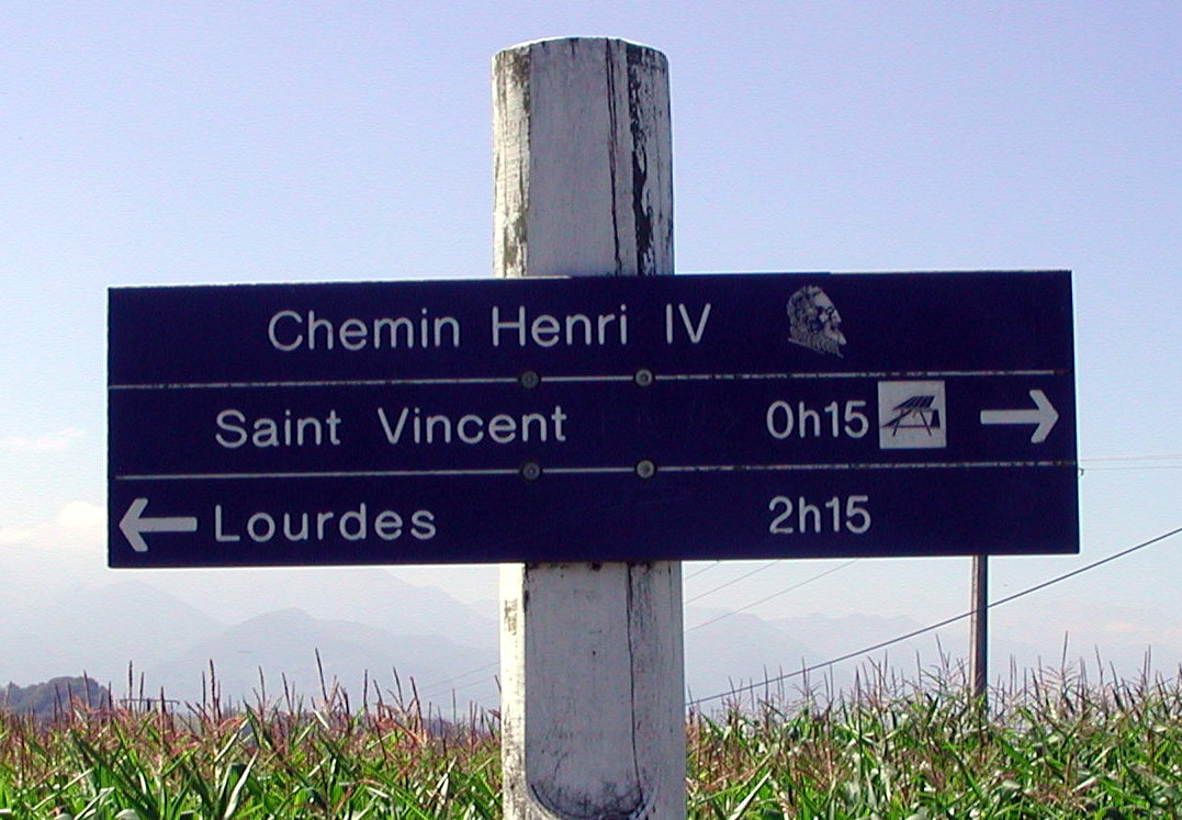 Exemple de balisage sur le chemin Henri IV